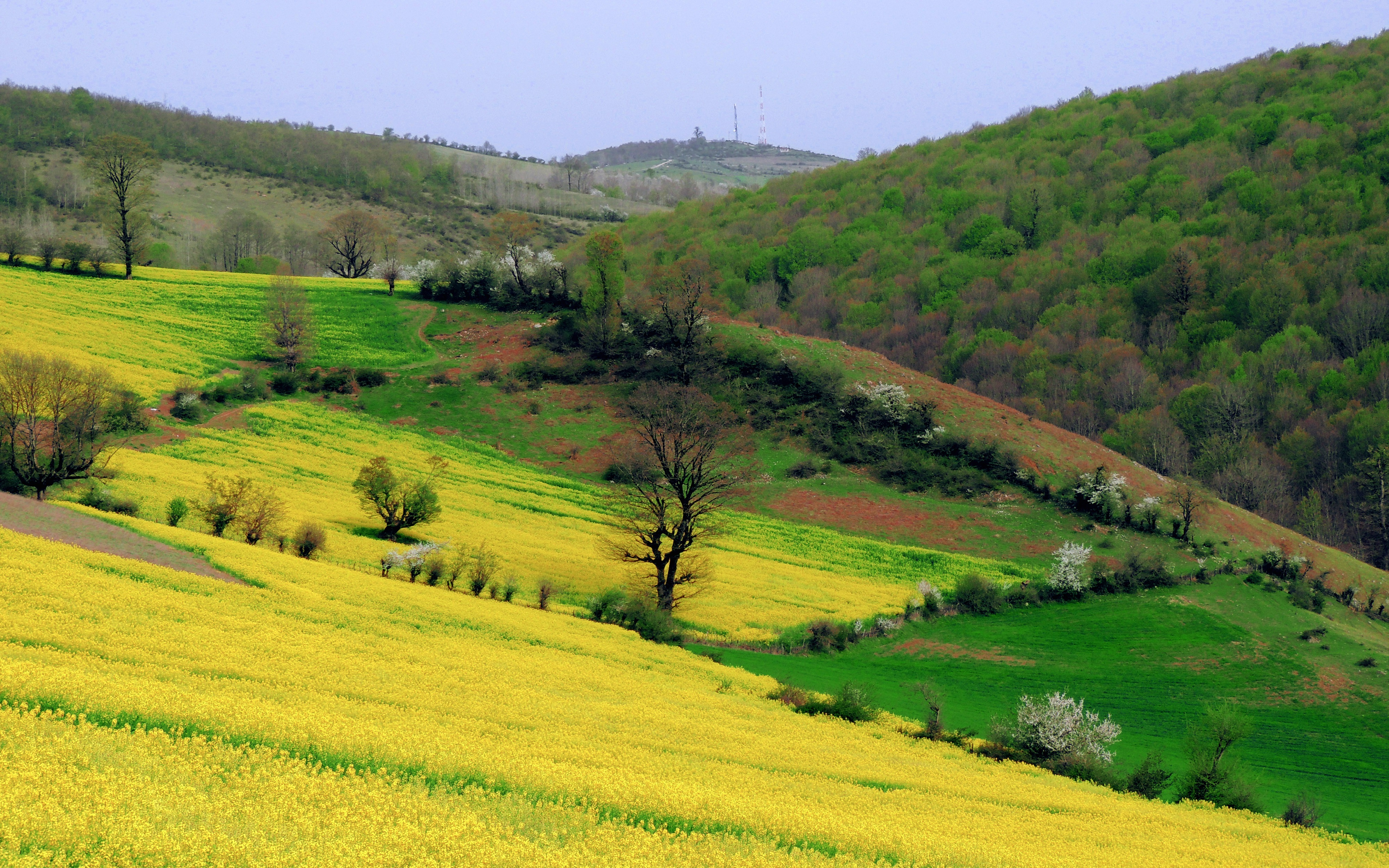 گندم ، کلزا ، جنگل شکوفه ی درختان ، درود به خالق زیبائی ها